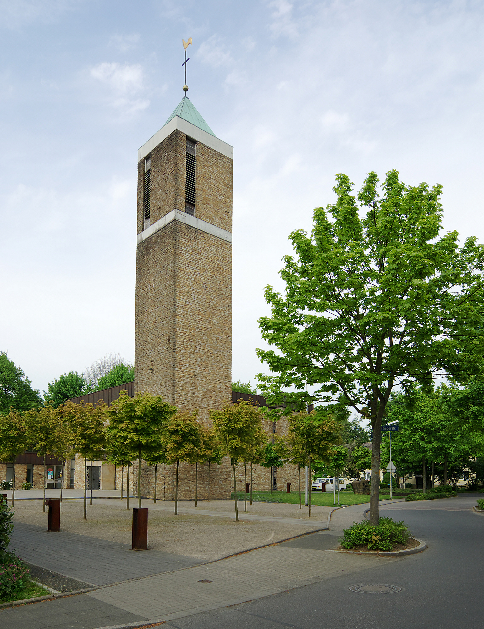 Die evangelische Paul-Gerhardt-Kirche in Unna-Königsborn, Nordrhein-Westfalen, Deutschland